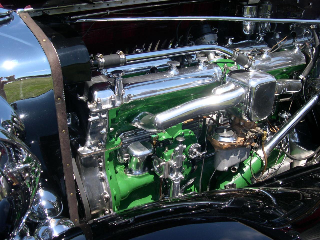 1934 Duesenberg J engine